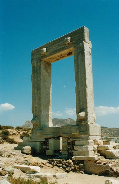 ПортираОстатки храма Апполона на острове Наксос